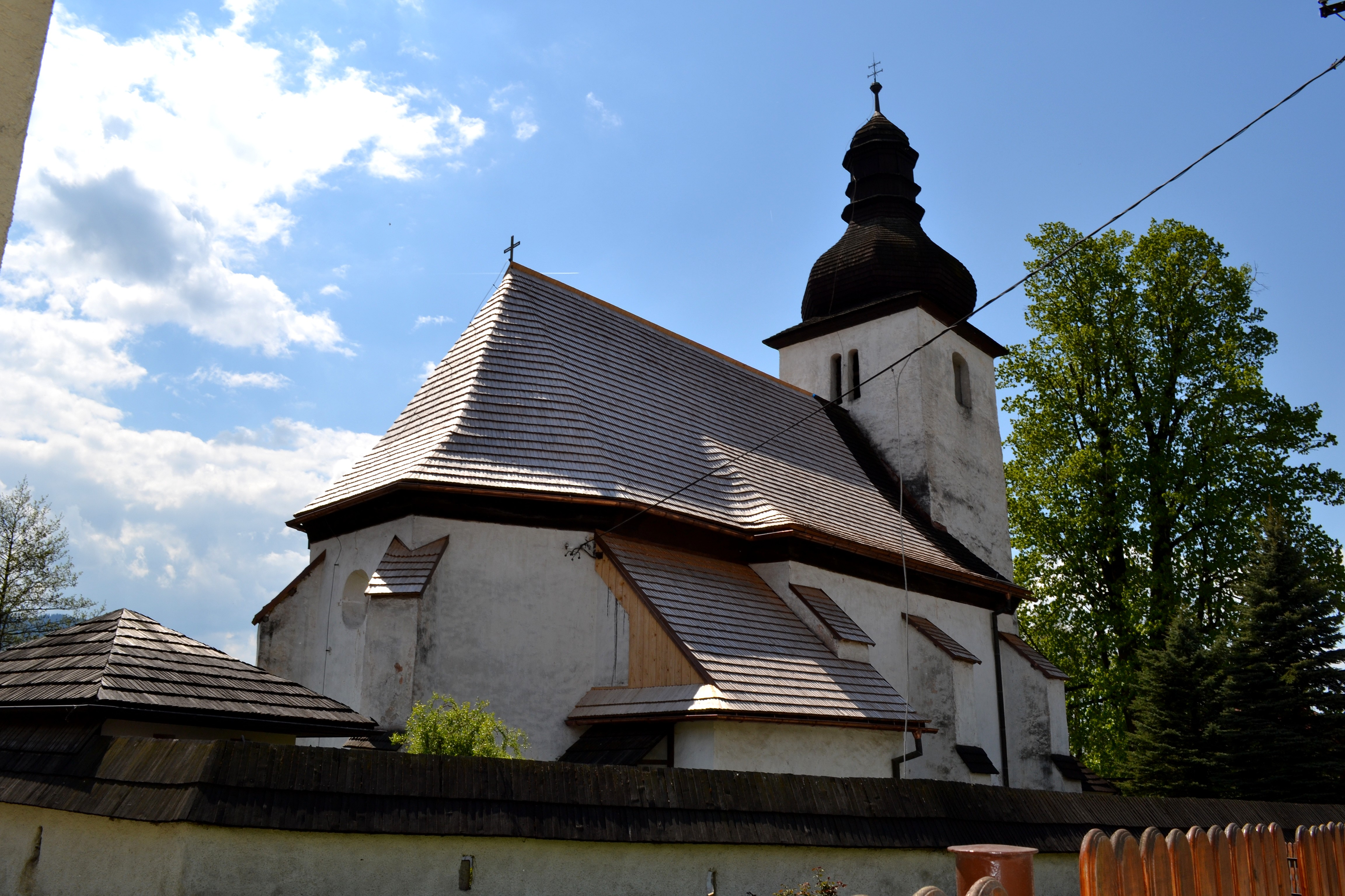 Turie (okr. Žilina), Kostol svätého Michala; pohľad od severovýchodu